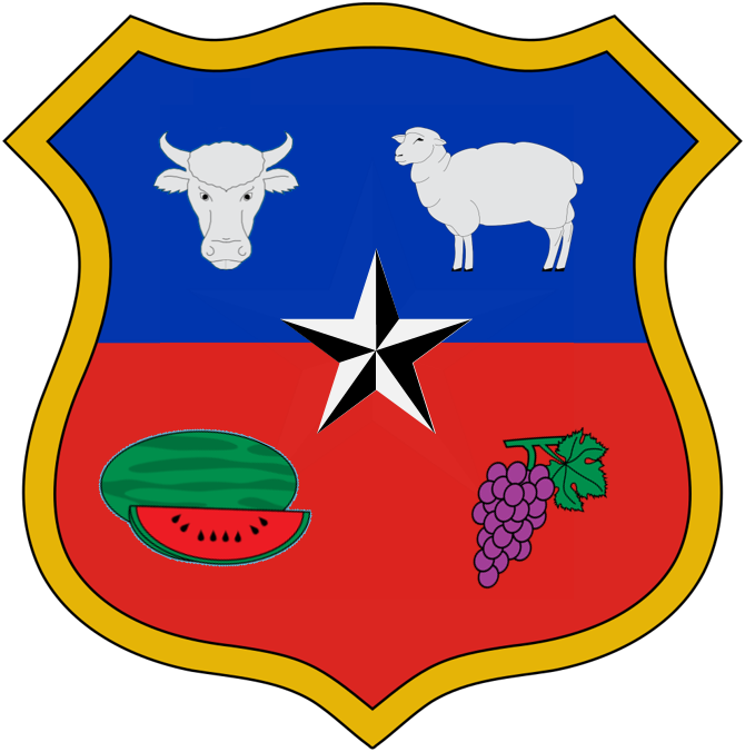 Escudo de armas de la ciudad y comuna de Pencahue (Chile)